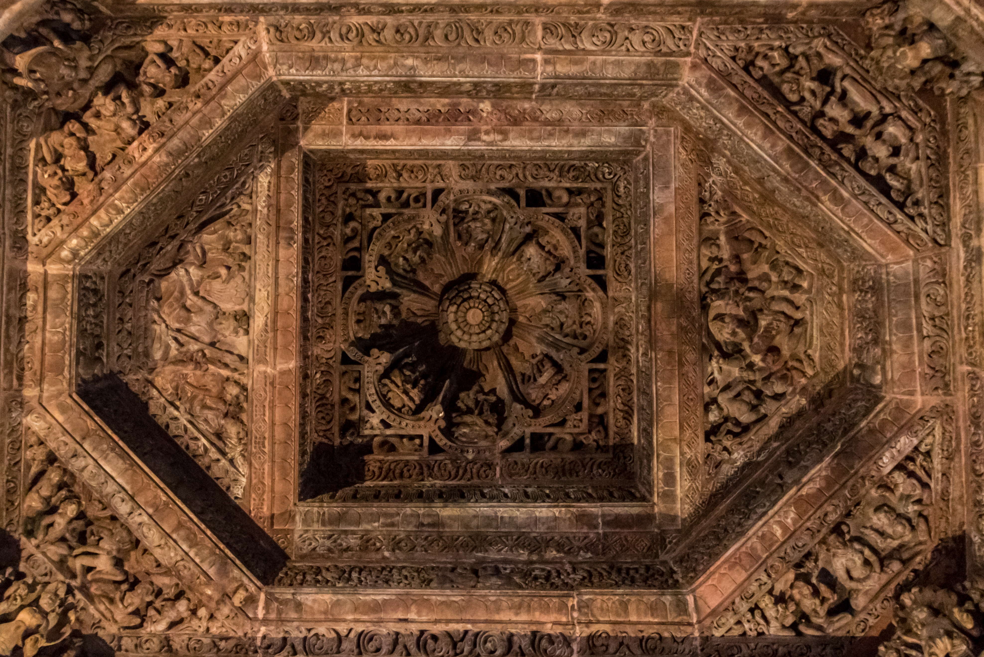 Mukteswar Mandir - Interior Ceiling